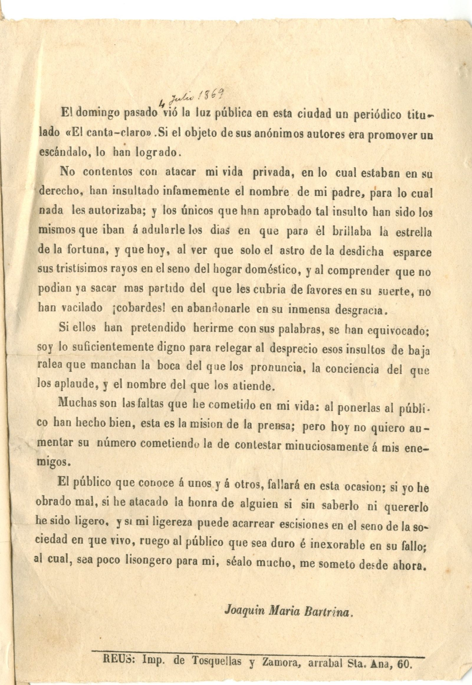 Queixa de Joaquim M. Bartrina pels atacs soferts pel Canta claro